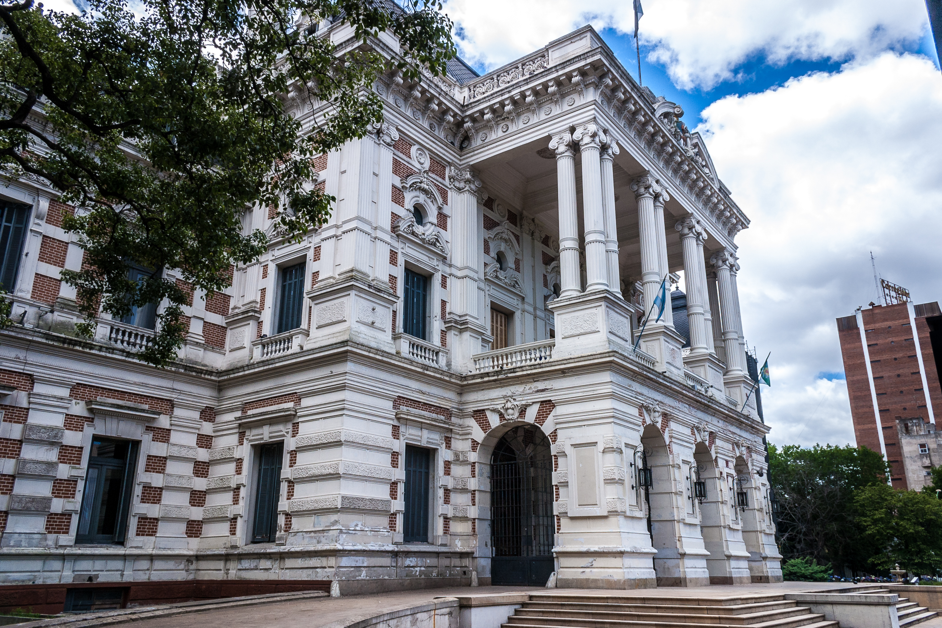 Casa de Gobierno de la Provincia de Buenos Aires, en La Plata, Argentina